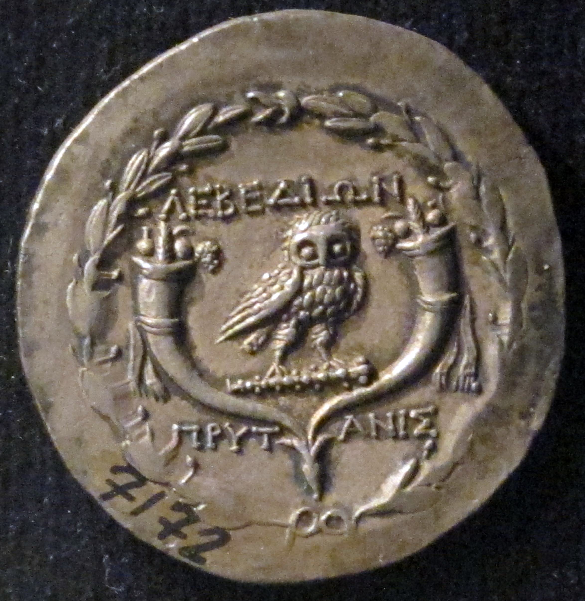 Tetradrachma di lebedos, recto